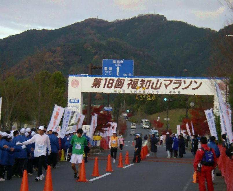 福知山マラソン 2008